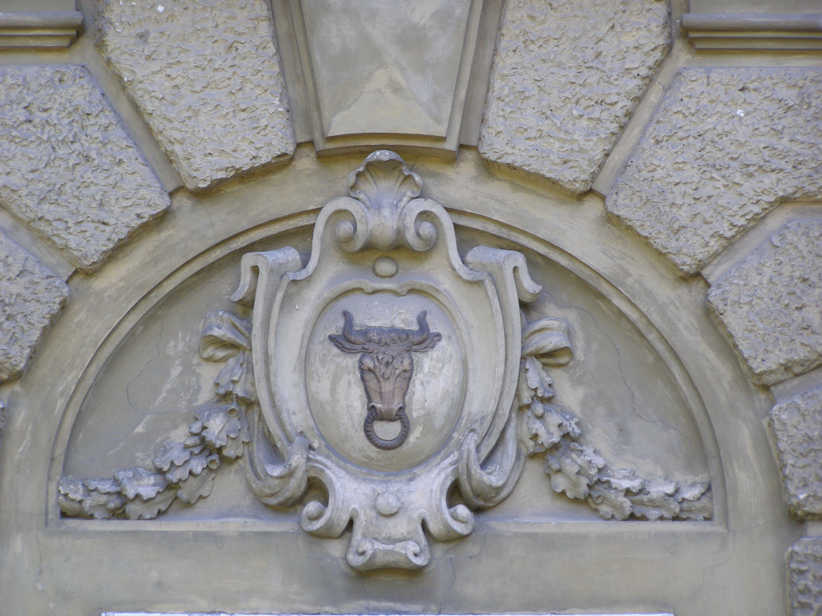 Łańcut - Zamek, herb Wieniawa